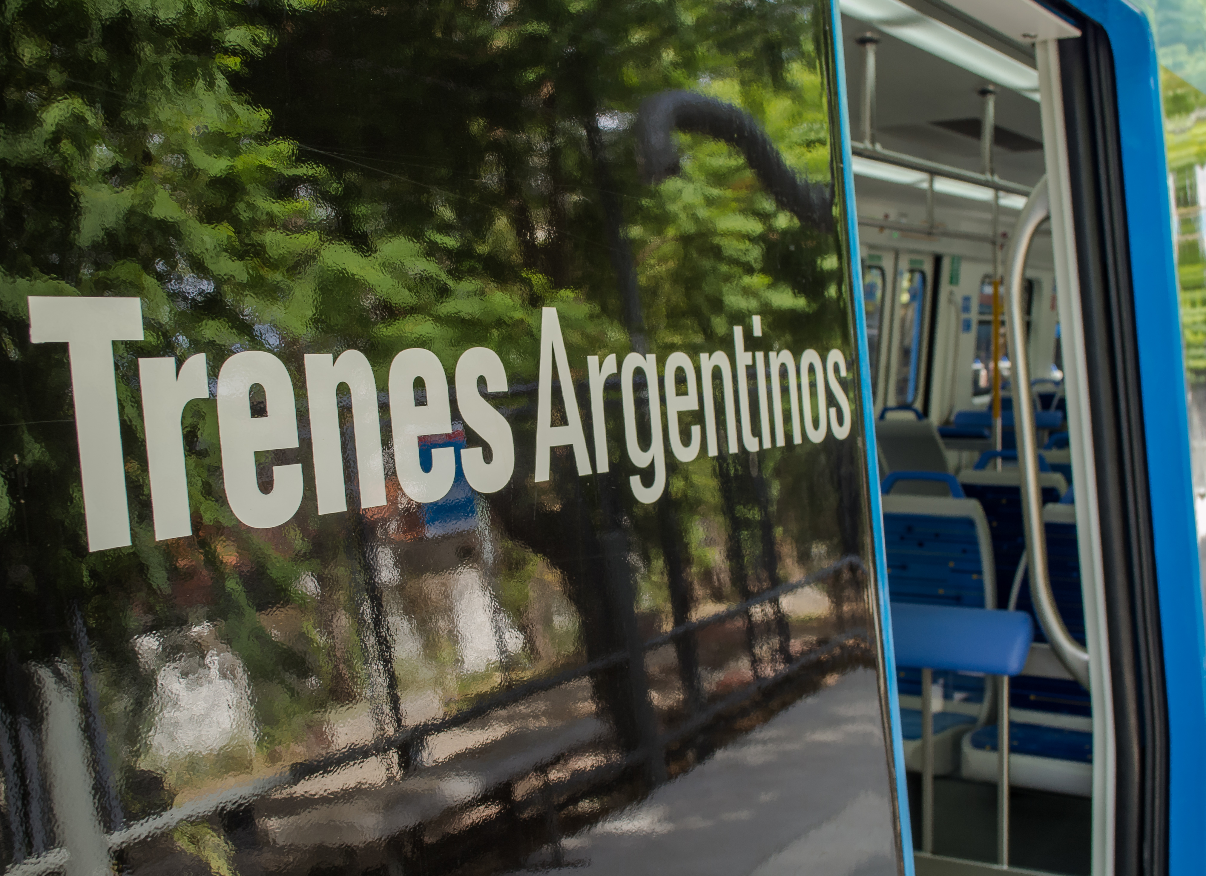 Logo de la empresa Trenes Argentinos, en un tren de la Línea Mitre. Estación Bartolomé Mitre (Olivos, Provincia de Buenos Aires)